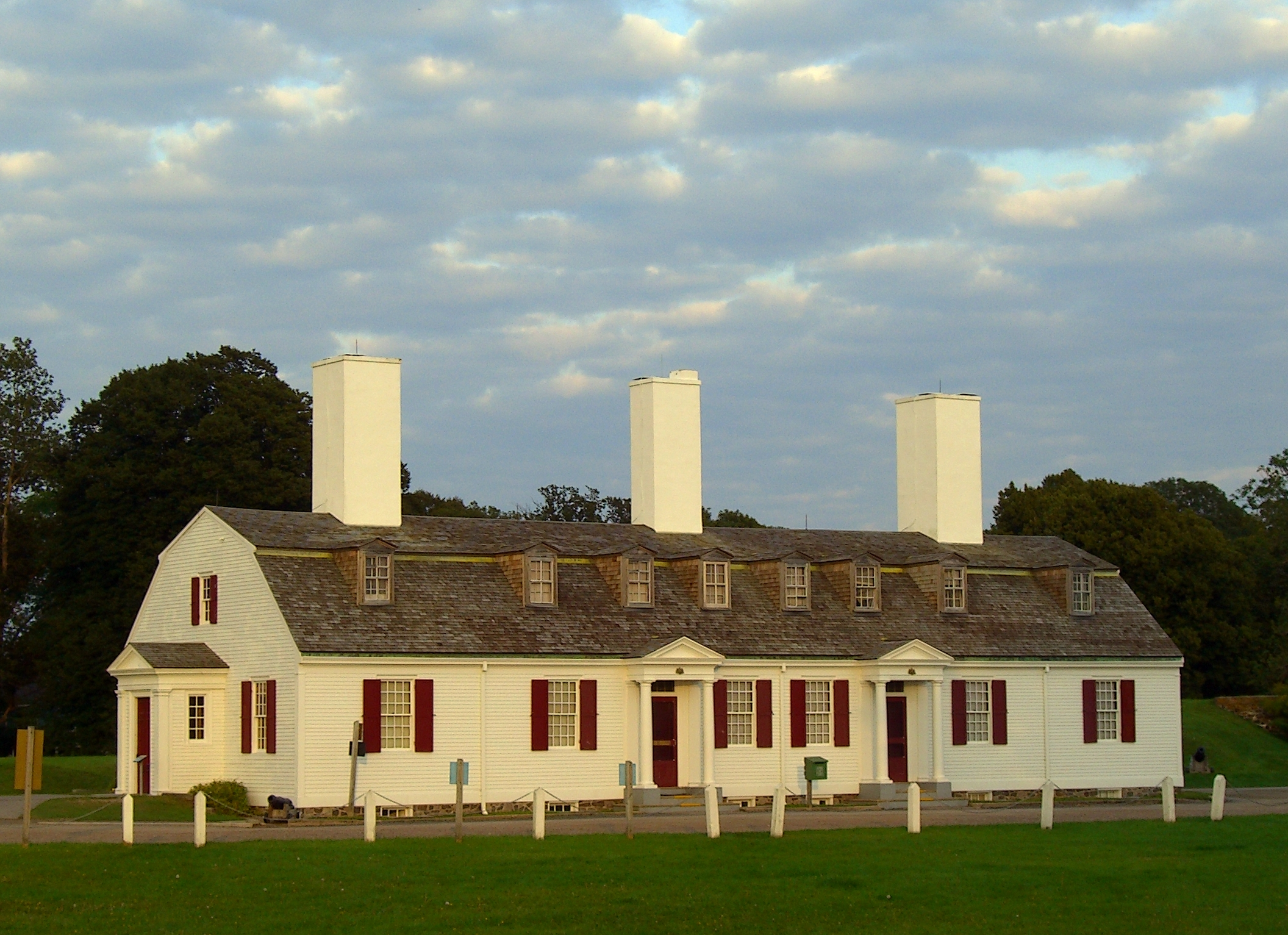 Le Fort Anne à Annapolis Royal en Nouvelle-Écosse